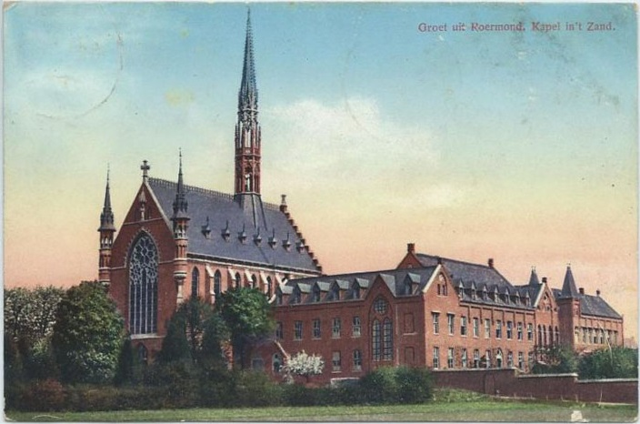 Kapel in 't Zand en Klooster paters Redemptoristen